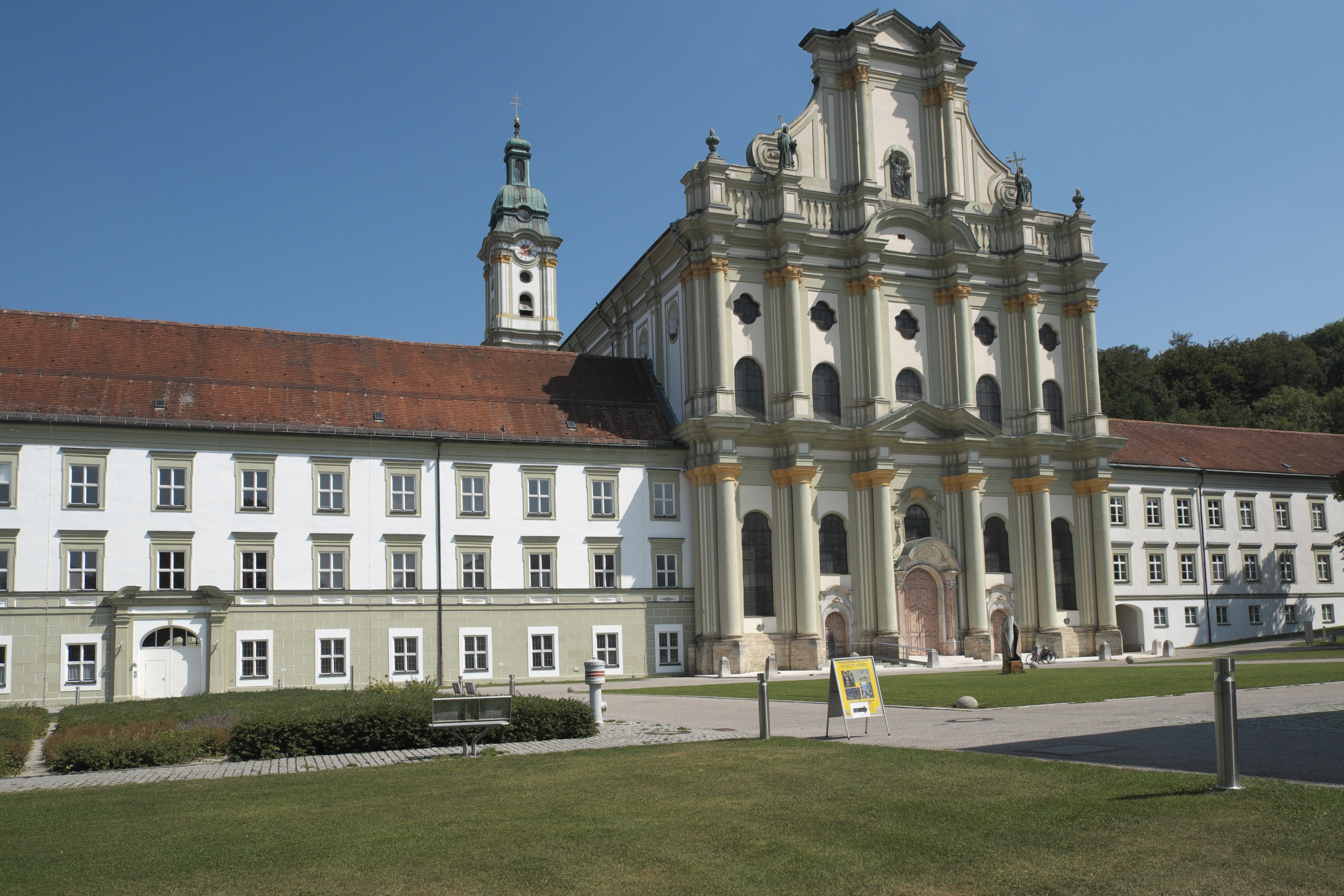 Ehemalige Zisterzienserklosterkirche St. Mariä Himmelfahrt in Fürstenfeldbruck im Landkreis Fürstenfeldbruck (Bayern/Deutschland)